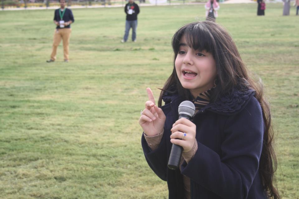 amal qutami